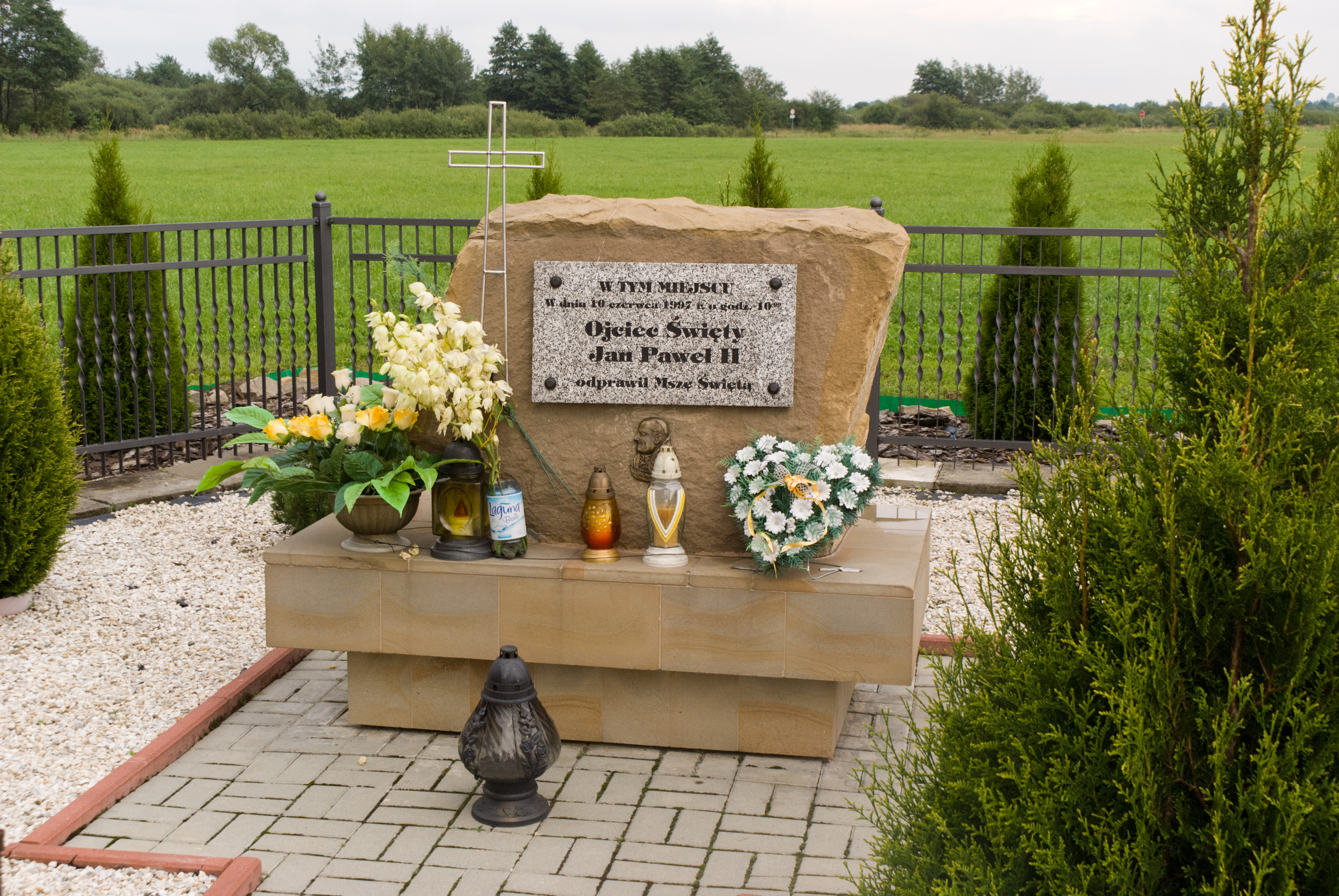 Tablica pamiątkowa na lotnisku w Krośnie: "W tym miejscu w dniu 10 czerwca 1997 r. o godz. 10:00 Ojciec Święty Jan Paweł II odprawił Mszę Świętą." Podczas tej mszy papież kanonizował św. Jana z Dukli.